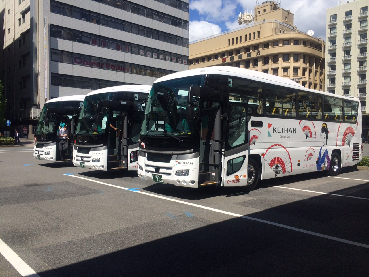 京阪バス舞妓